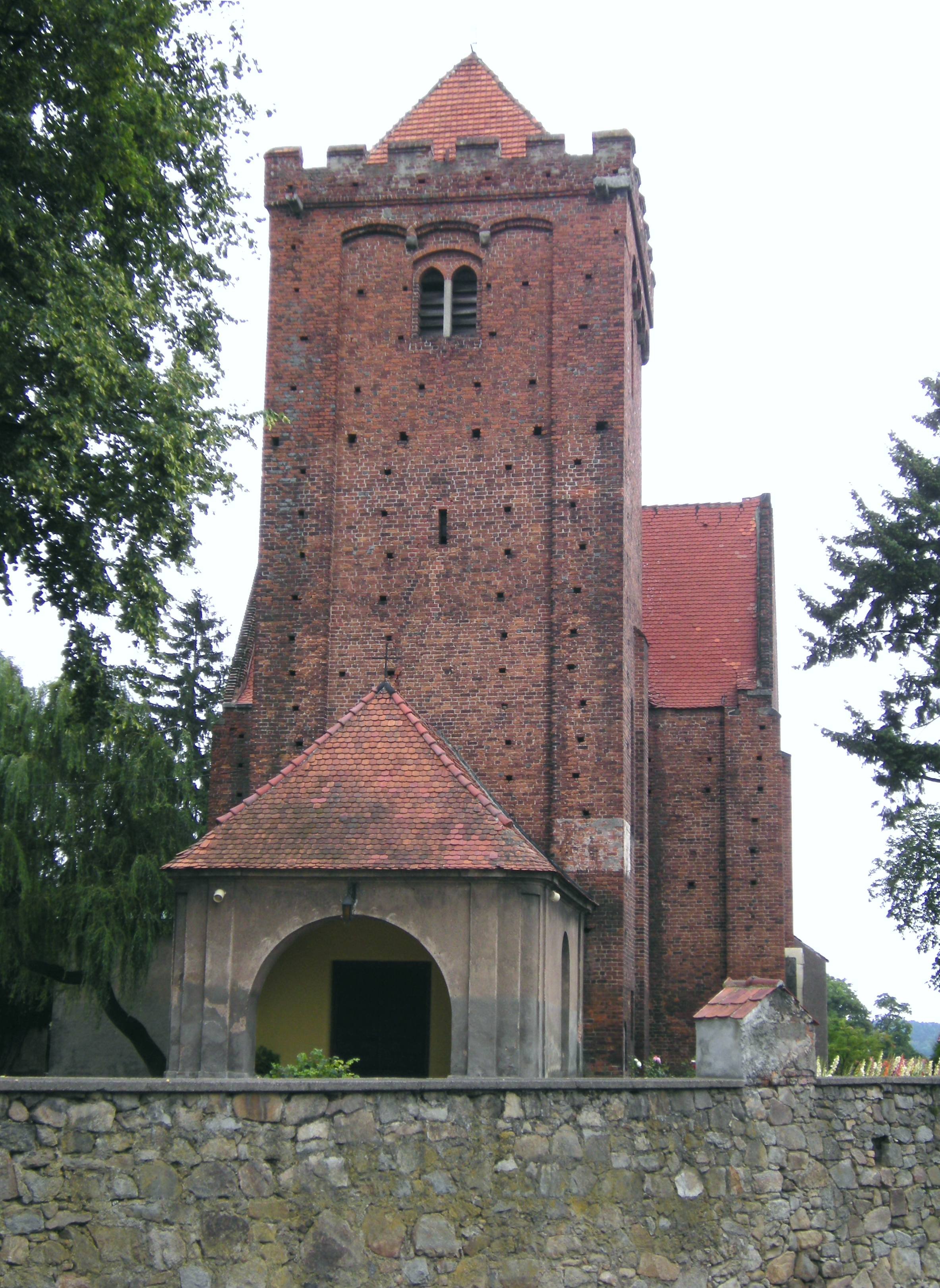 Kościół w Kałkowie